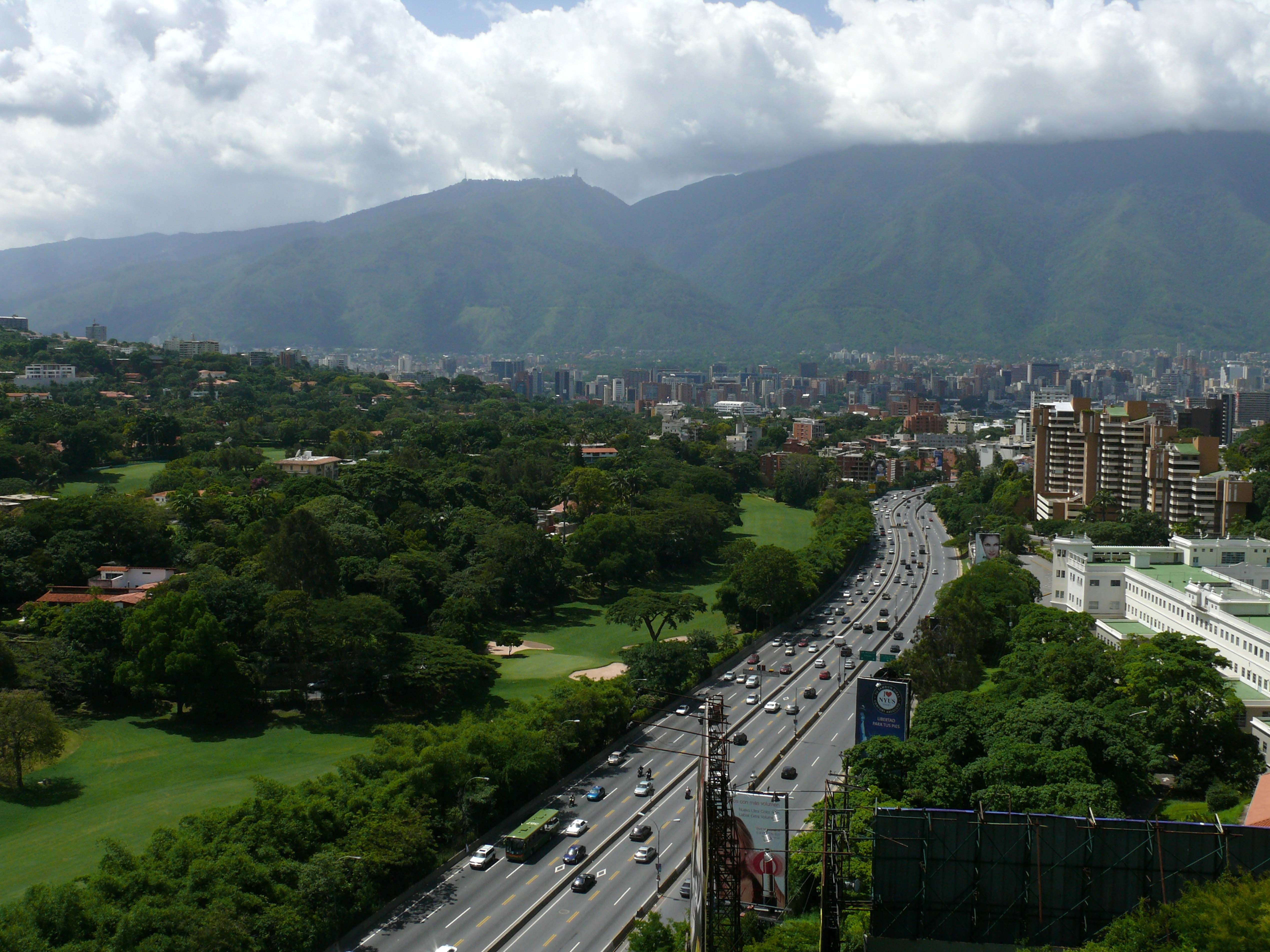 Prados del Este hacia Caracas